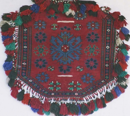 Yəhərüstü (Yəhər üzü, Yəhərüzlüyü) — Azərbaycanda yəhərin üstünə salınmaq üçün toxunan kiçik ölçülü xovlu xalça.